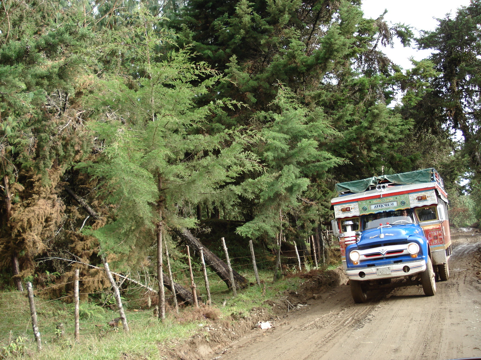 Chiva en el municipio de Abejorral, Antioquia.